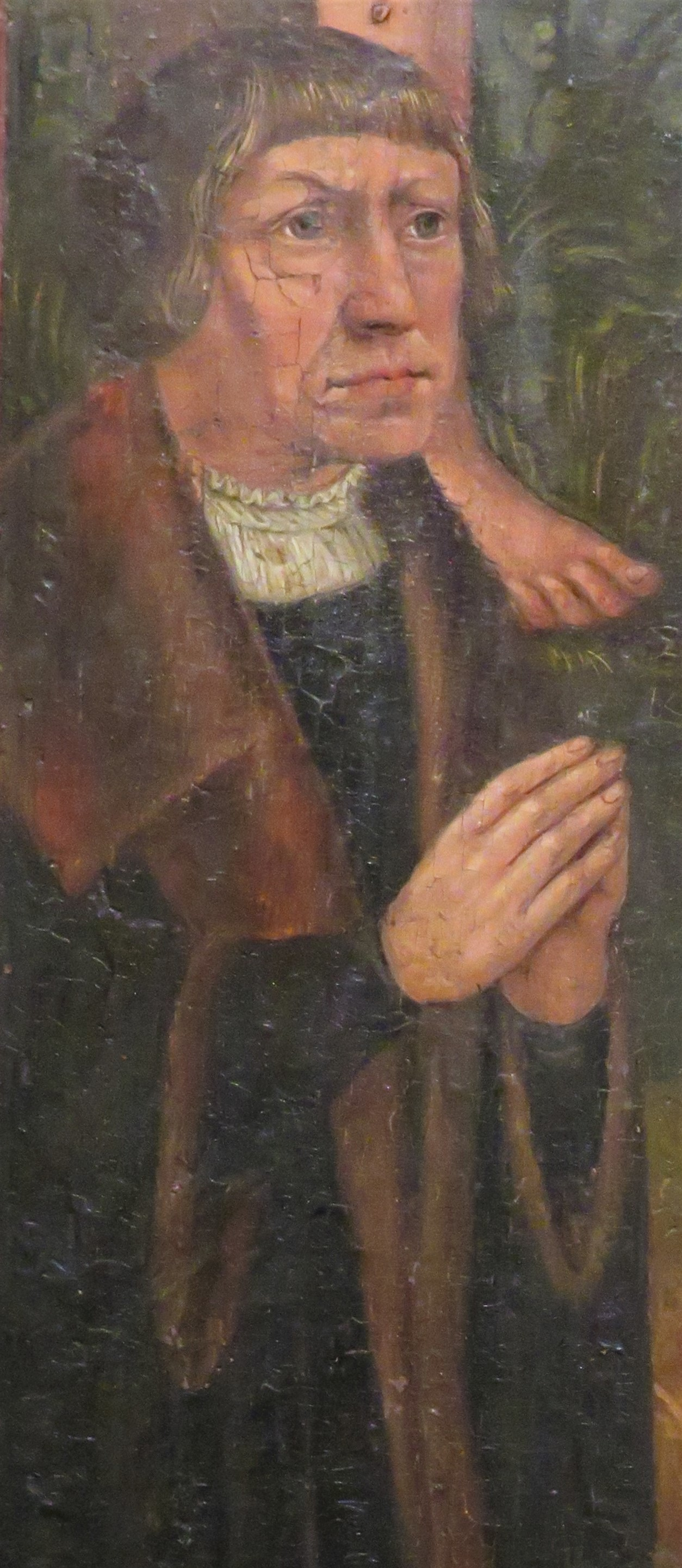 Lambert Wittinghoff, Detail aus seinem Votivbild "Taufe Christi" von Hans Kemmer